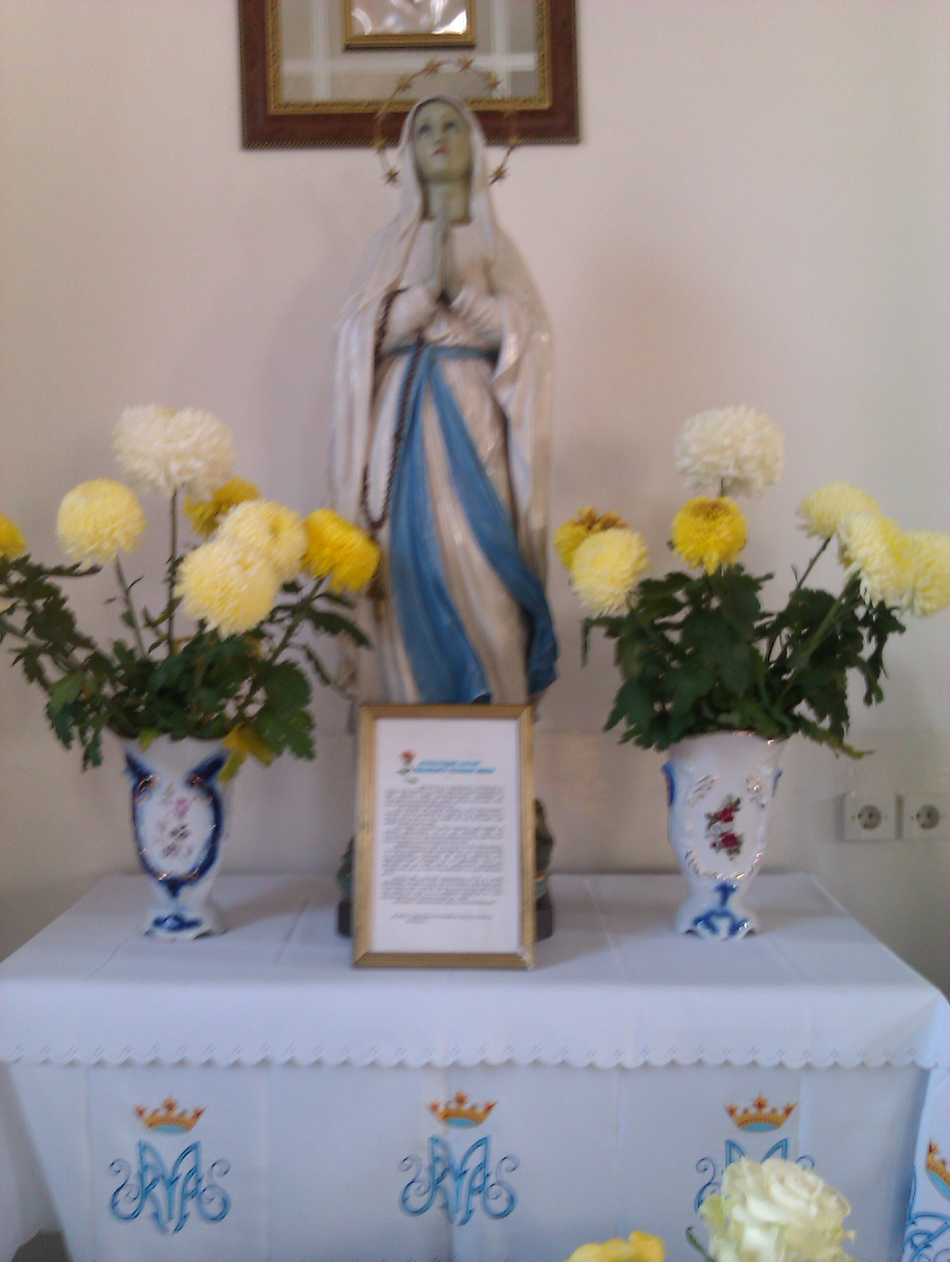 Biserica Romano-Catolică din Giurgiu. Maica Domnului